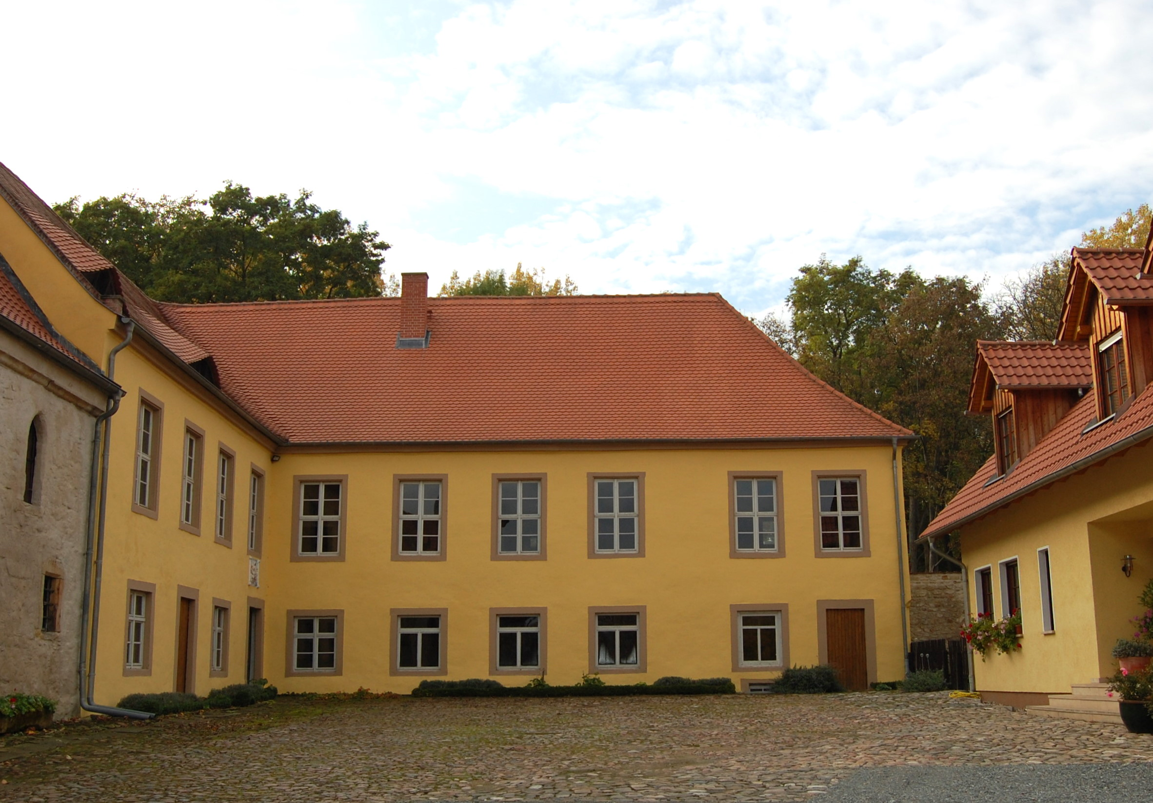 Gebäude der Komturei Bergen